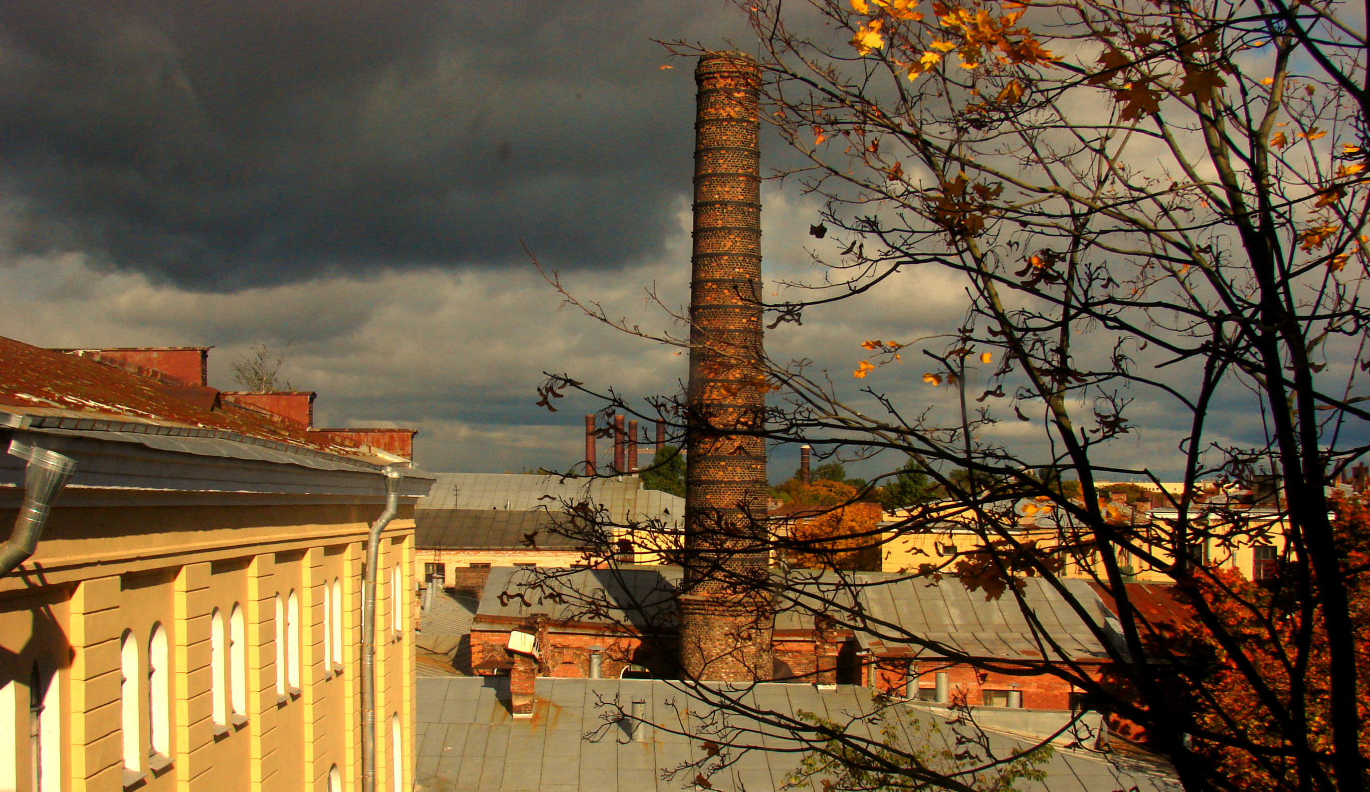 Вид на внутренний двор С.П.Б. Технологического института.